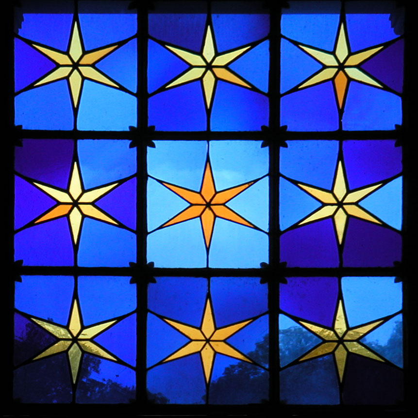 Glasfenster im Oberlicht der Eingangstür des Schlosses Charlottenhof in Potsdam